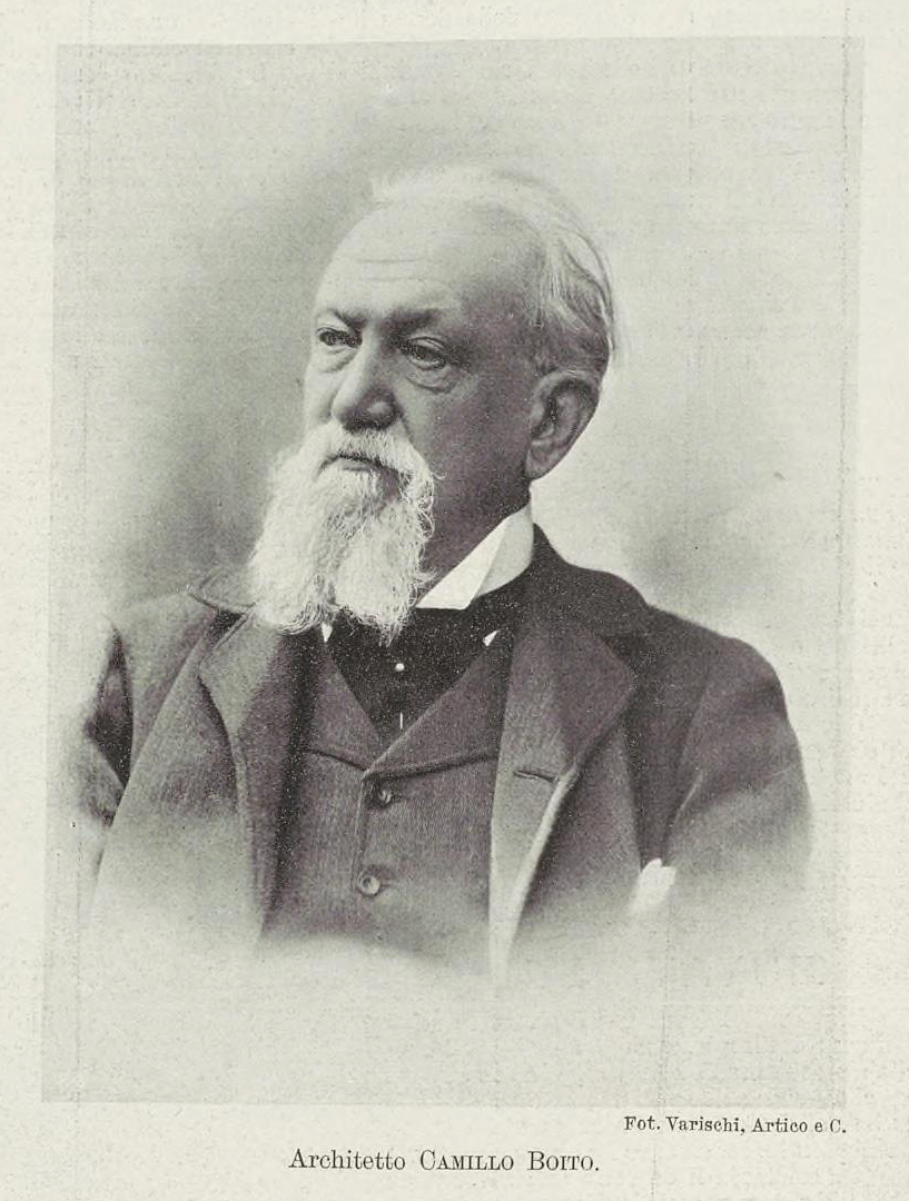 Arch. Camillo Boito (1836-1914)